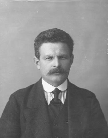 Депутат Четвертой Государственной думы от Московской губернии Р.В.Малиновский.